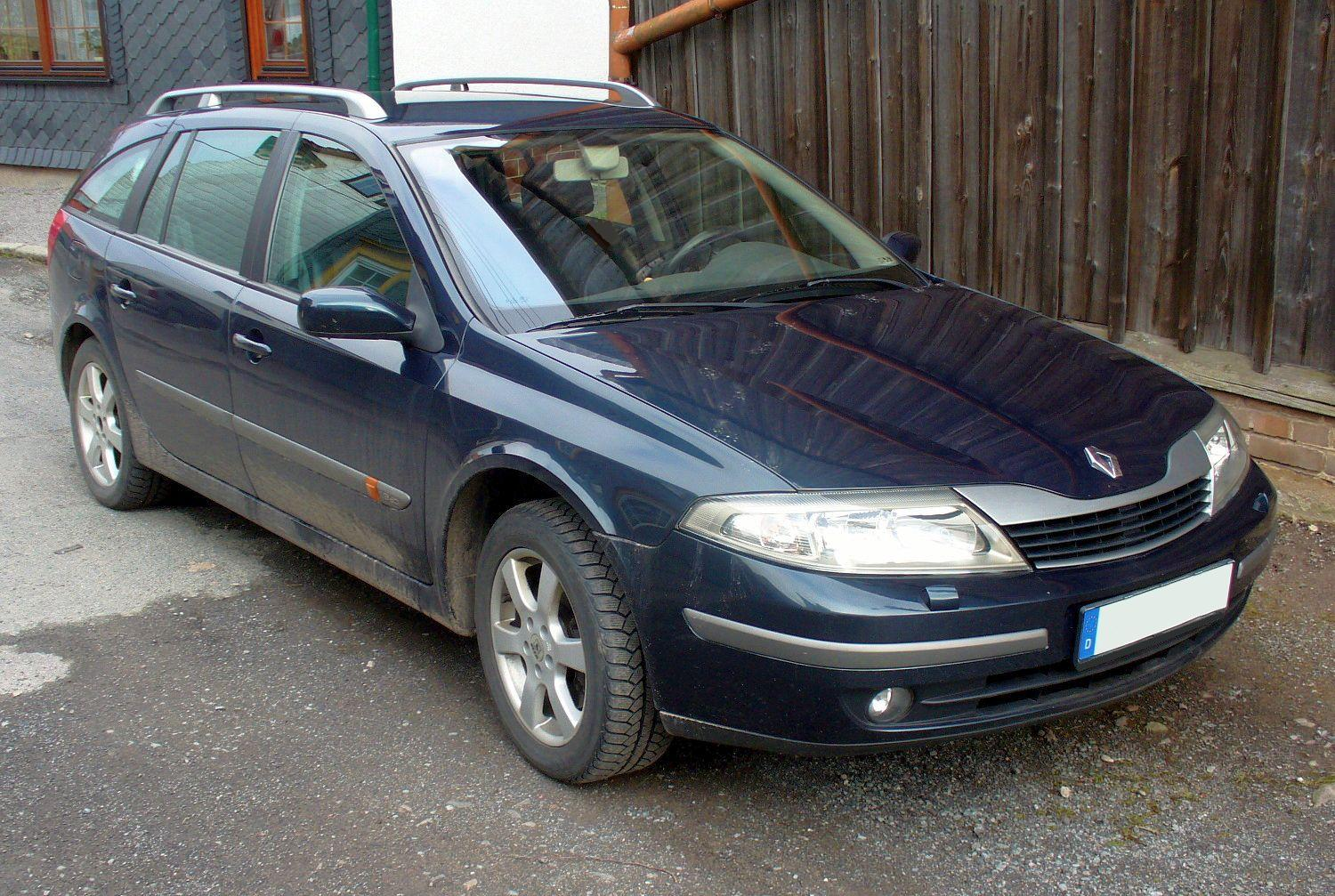 Renault Laguna II Grandtour